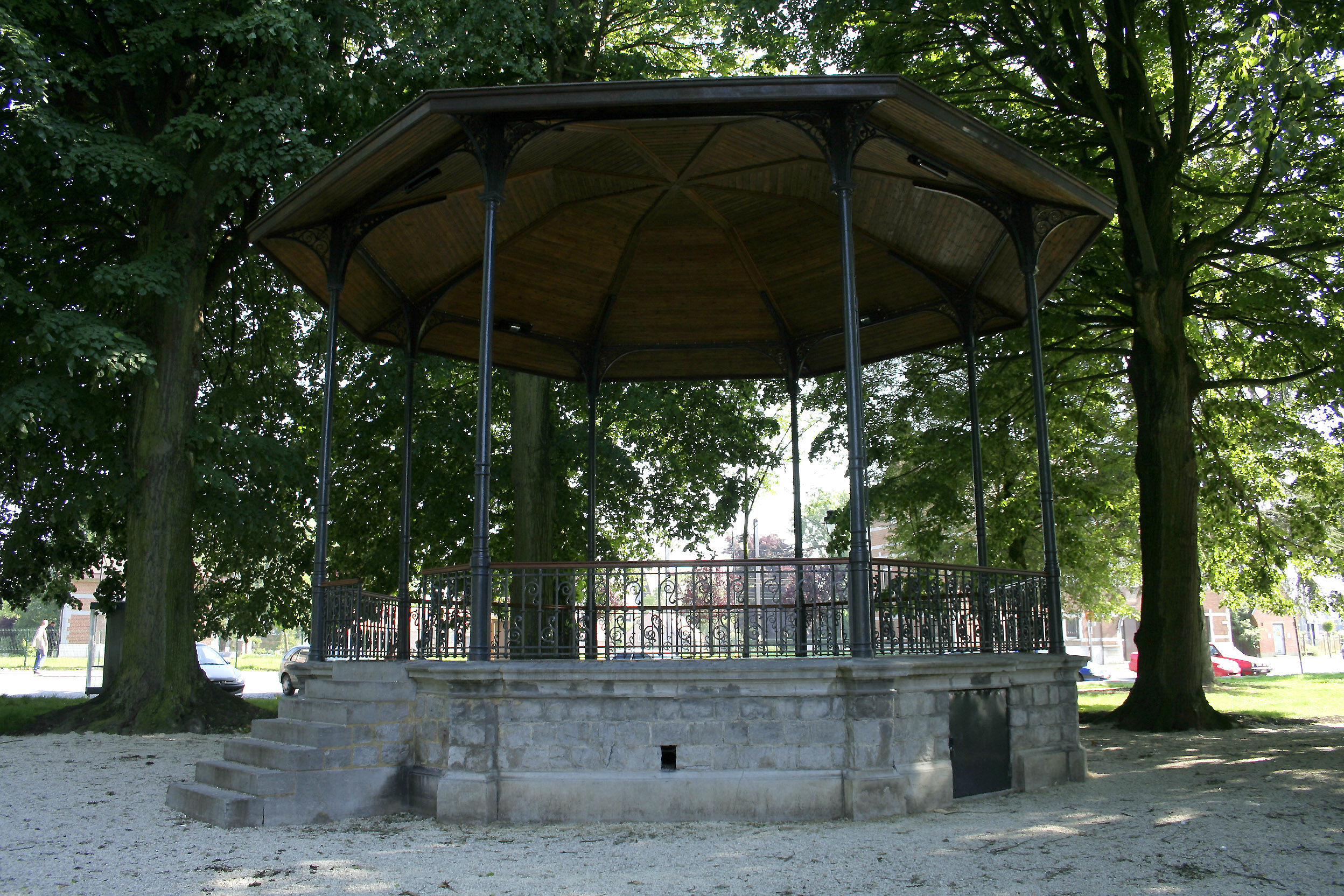 Soignies (Belgique), square Jules Bordet - Le kiosque à musique construit par en 1893 Jean-Baptiste Havaux .